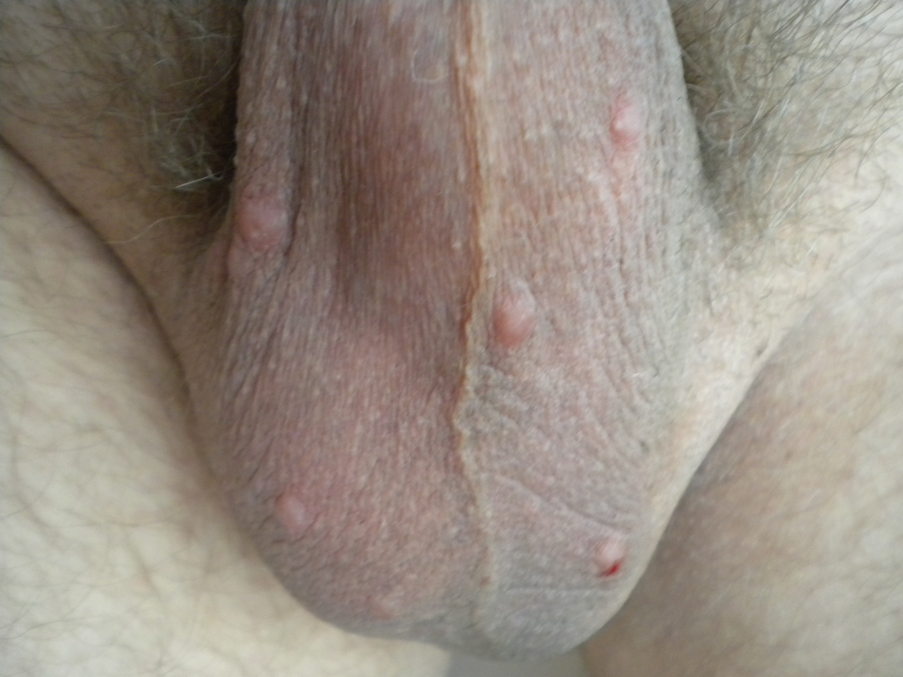 Скабиозная лимфоплазия на коже мошонки.